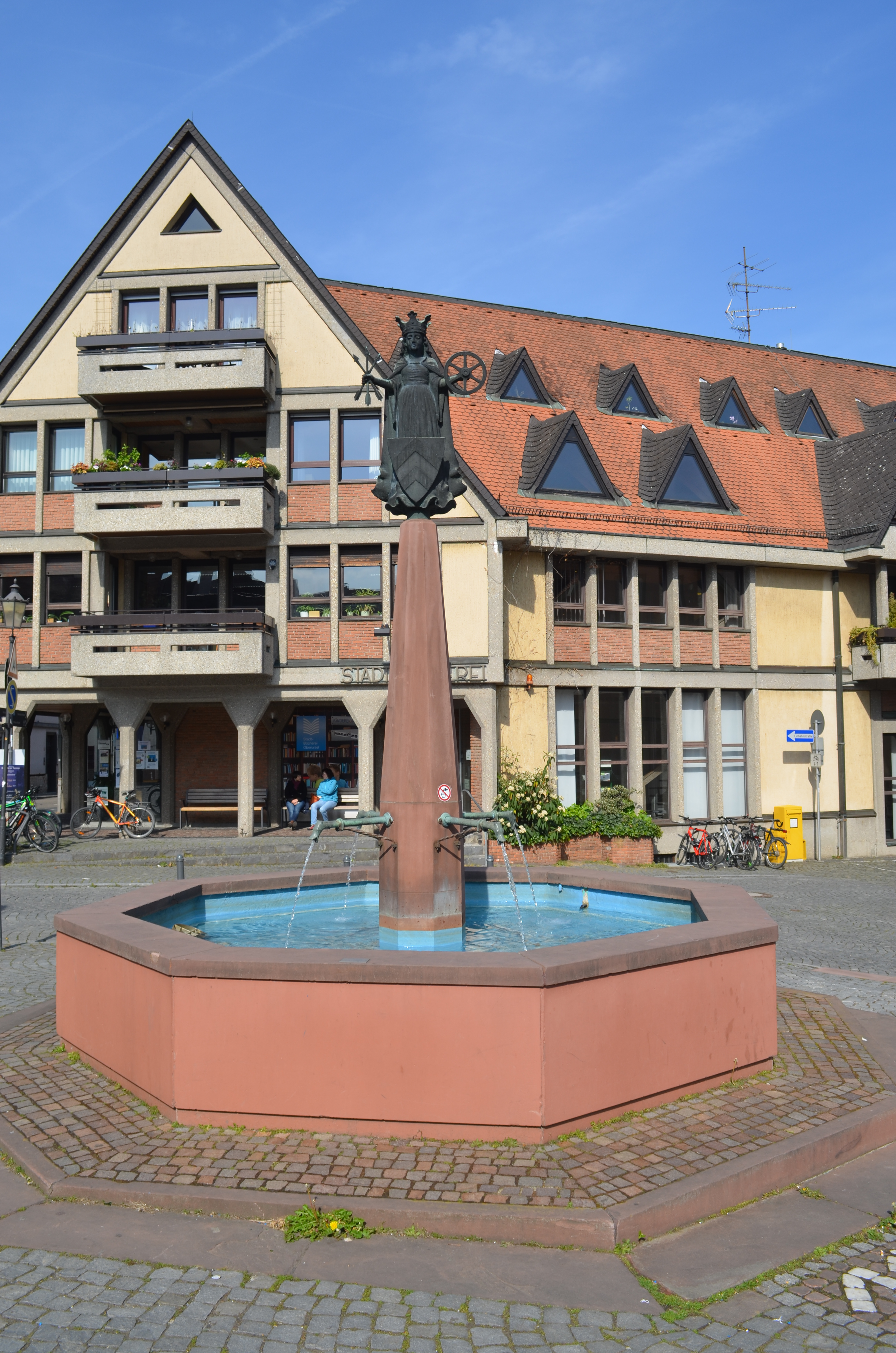 Oberursel,St. Ursula-Brunnen Der Brunnen wurde am 17. November 1962 eingeweiht. Die Bronzefigur auf der Spitze stellt die Stadtpatronin St. Ursula dar und wurde vom Oberurseler Bildhauer Harold Winter (1887 - 1969) geschaffen. Sie trägt in der einen Hand das Mainzer Rad zur Erinnerung an die Mainzer Herrschaft über Oberursel, in der anderen drei Pfeile, die auf ihr Martyrium verweisen. Zu Füßen hat sie das Oberurseler Stadtwappen.